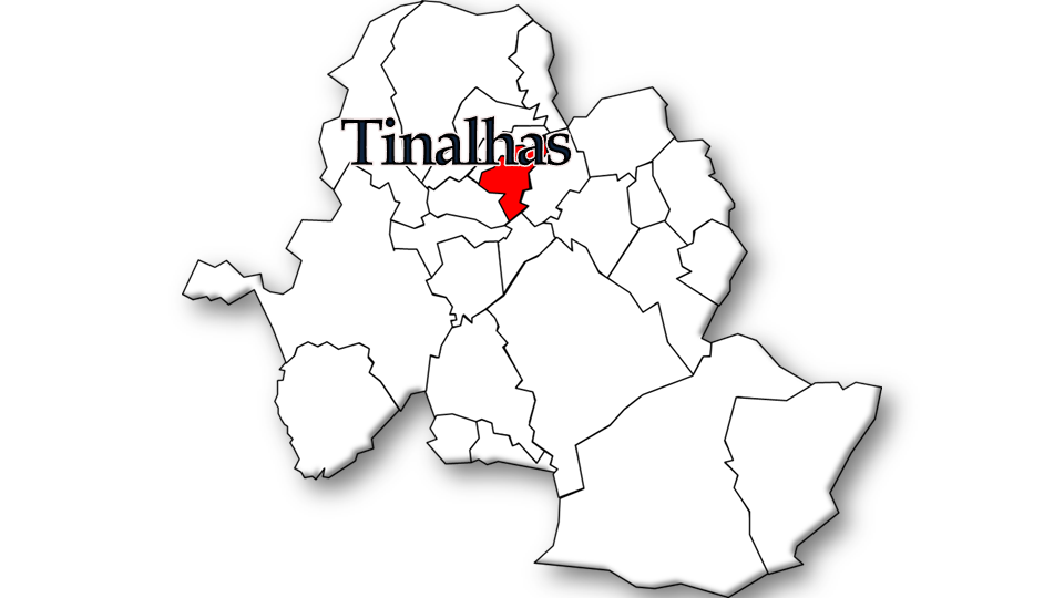 População